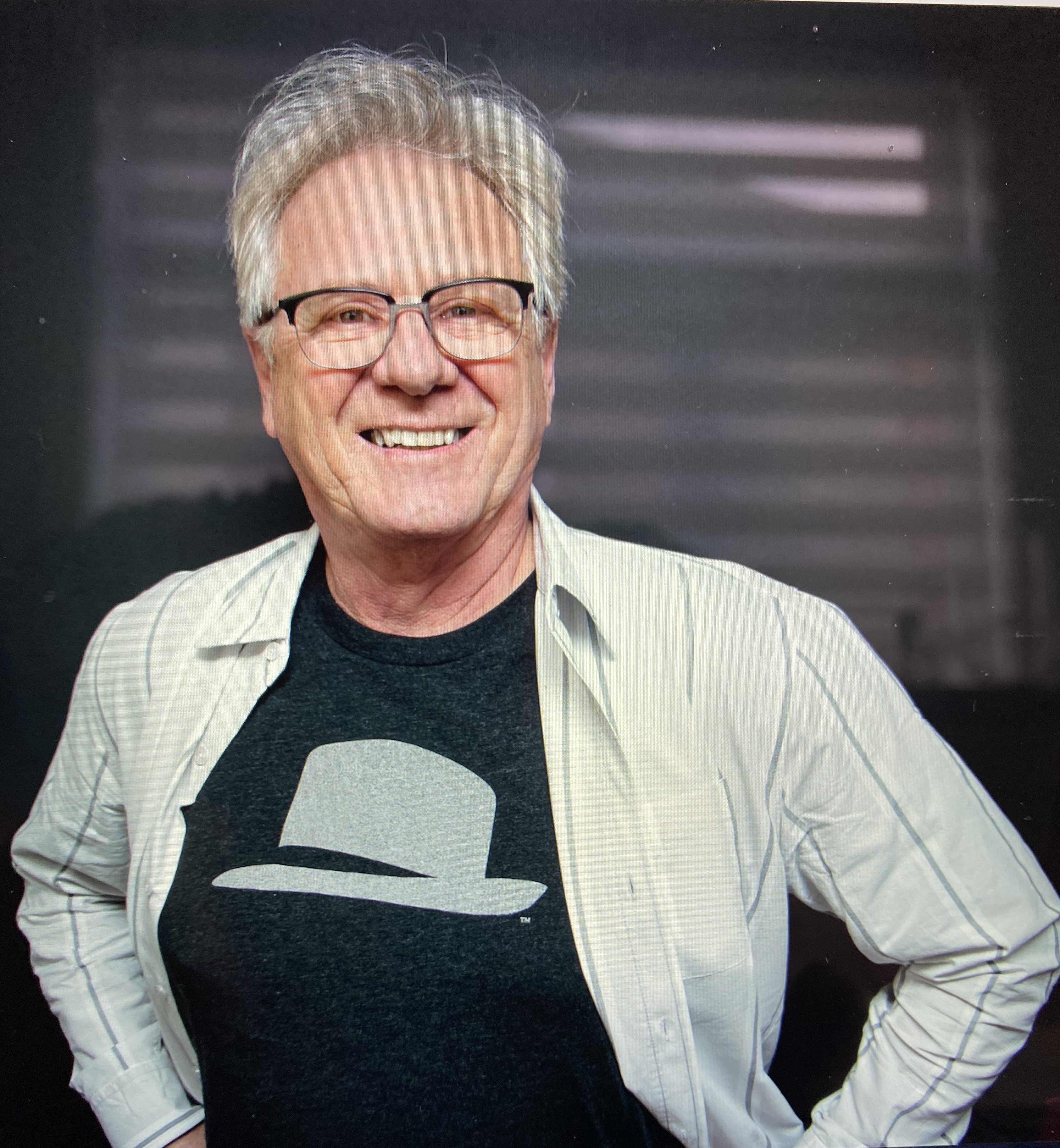 Portrait de l'animateur